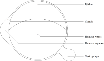 Decription : Coupe sagitale de l'œil. Auteur : V. M. V. M.